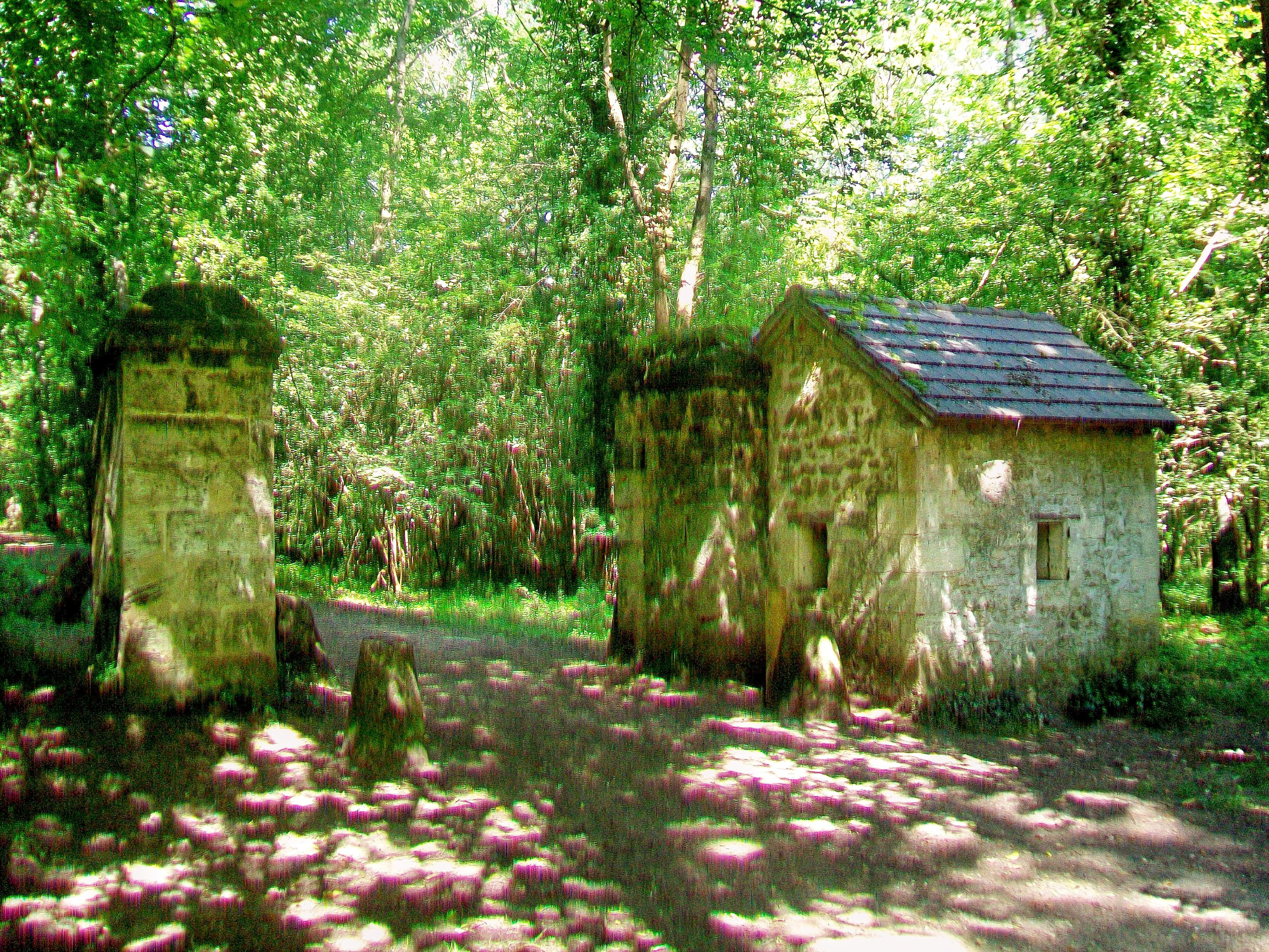 La Loge au bois départemental de Morval, située sur le principal chemin forestier.